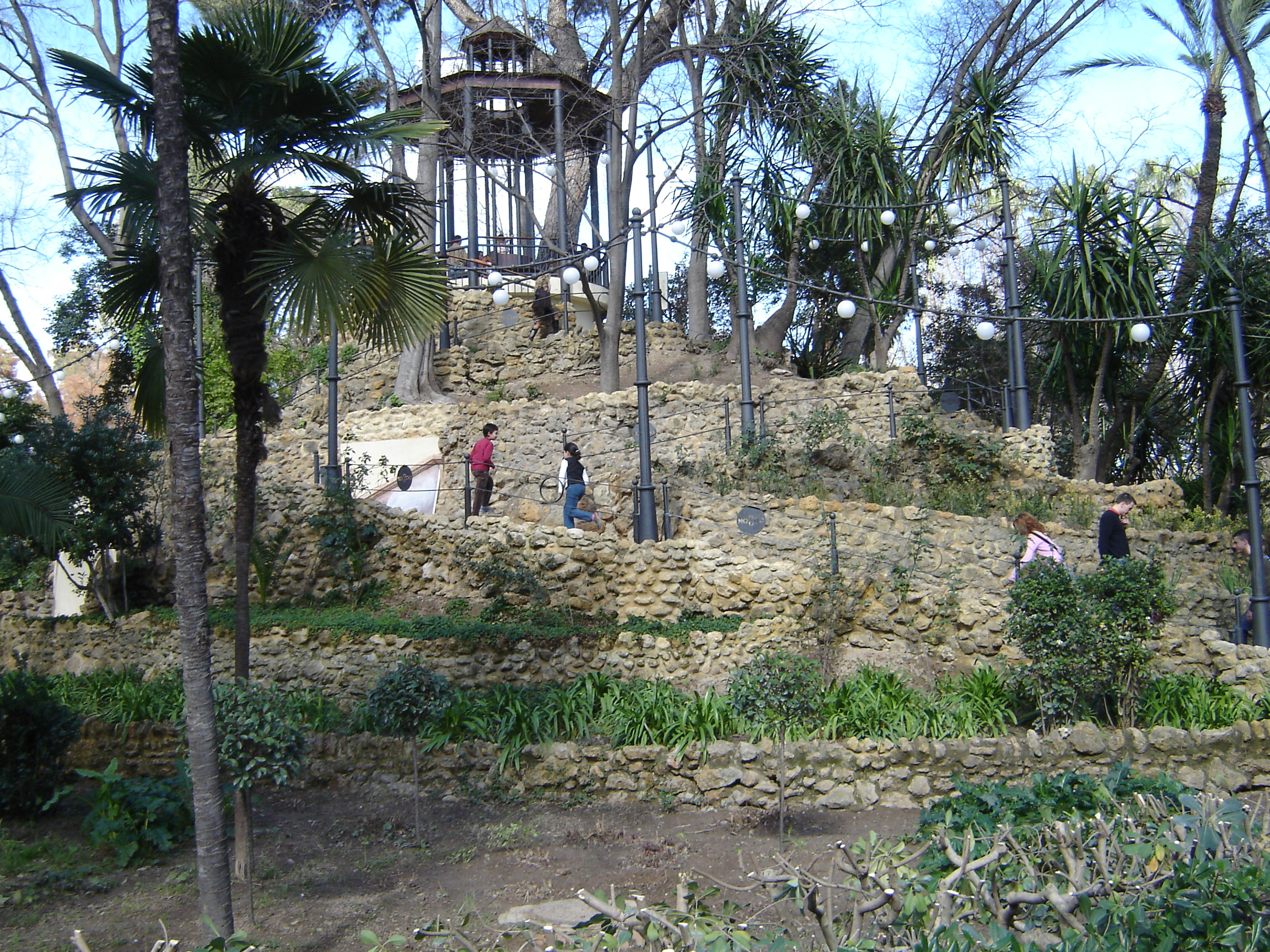 Monte Gurugú, escalinata de subida y bajada. Parque de María Luisa (Sevilla). Realización propia.